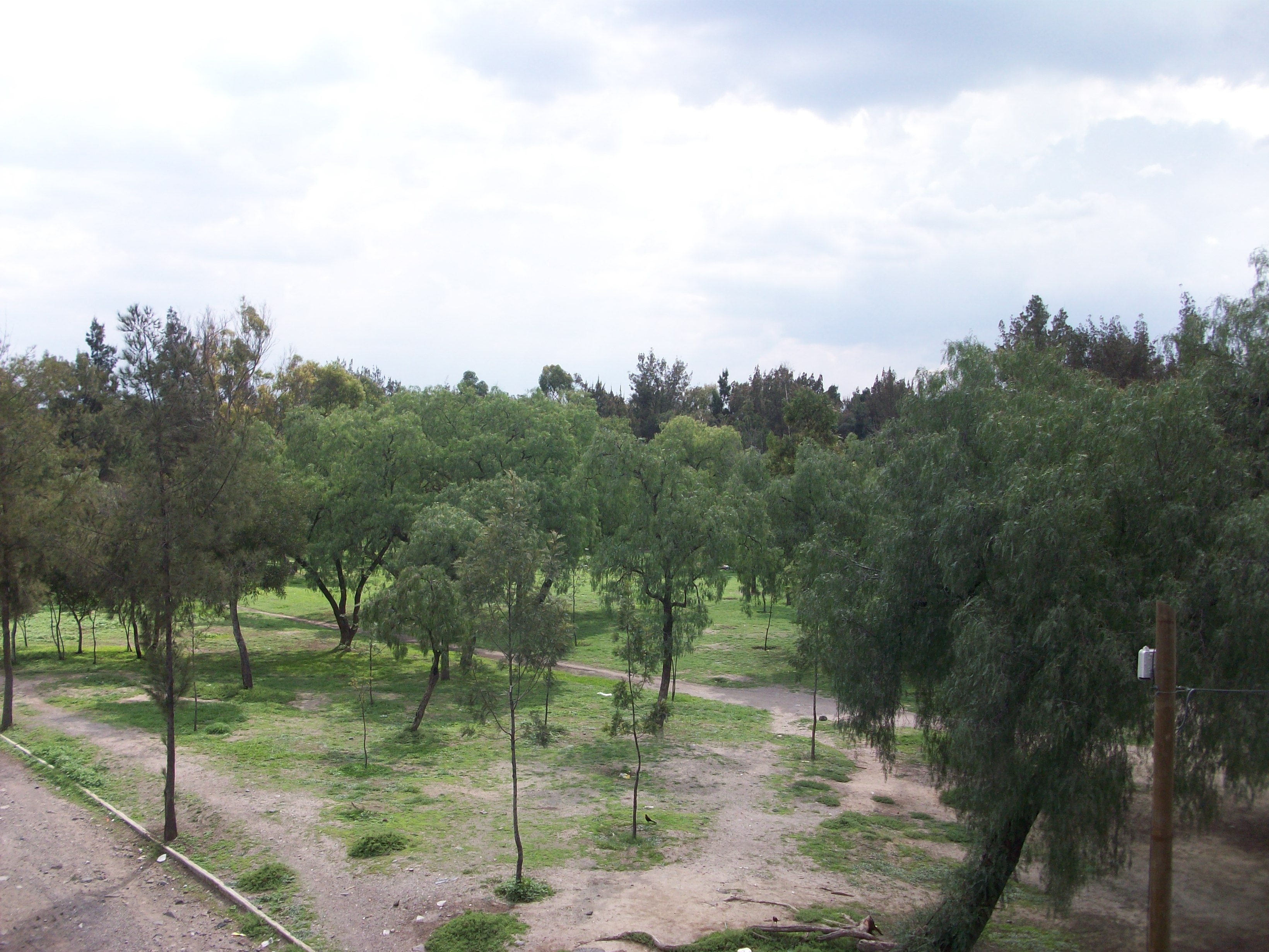 Bosque de aragon desde la estacion Bosque de Aragon